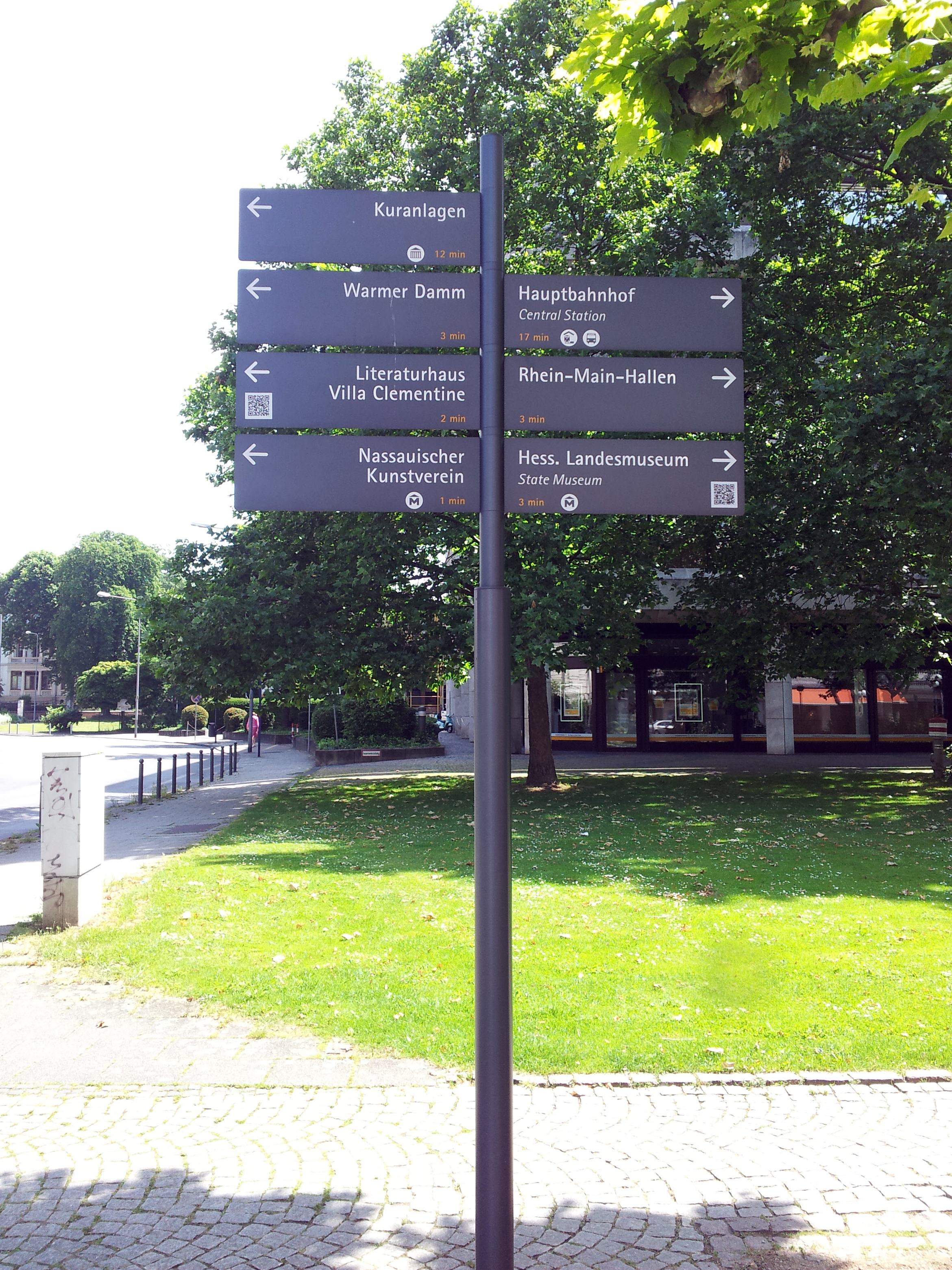 Visuelles Leitsystem in Wiesbaden für Fußgänger, Schriftart "Rotis sans serif"